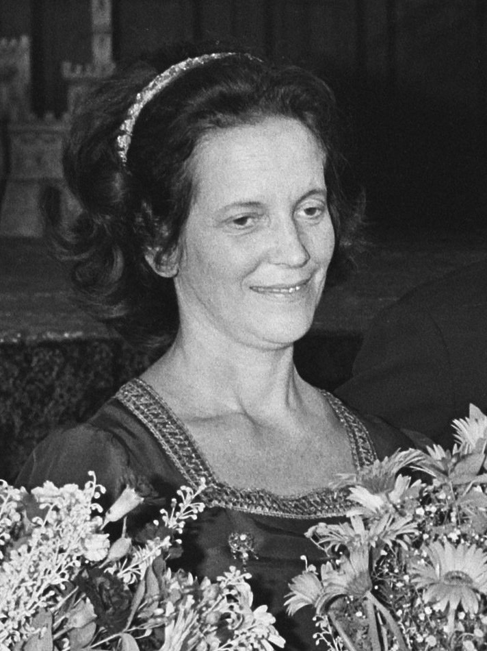 Erasmusprijs 1980 uitgereikt. Marie Leonhardt-Amsler (echtgenote van Gustav Leonhardt). Datum 8 september 1980